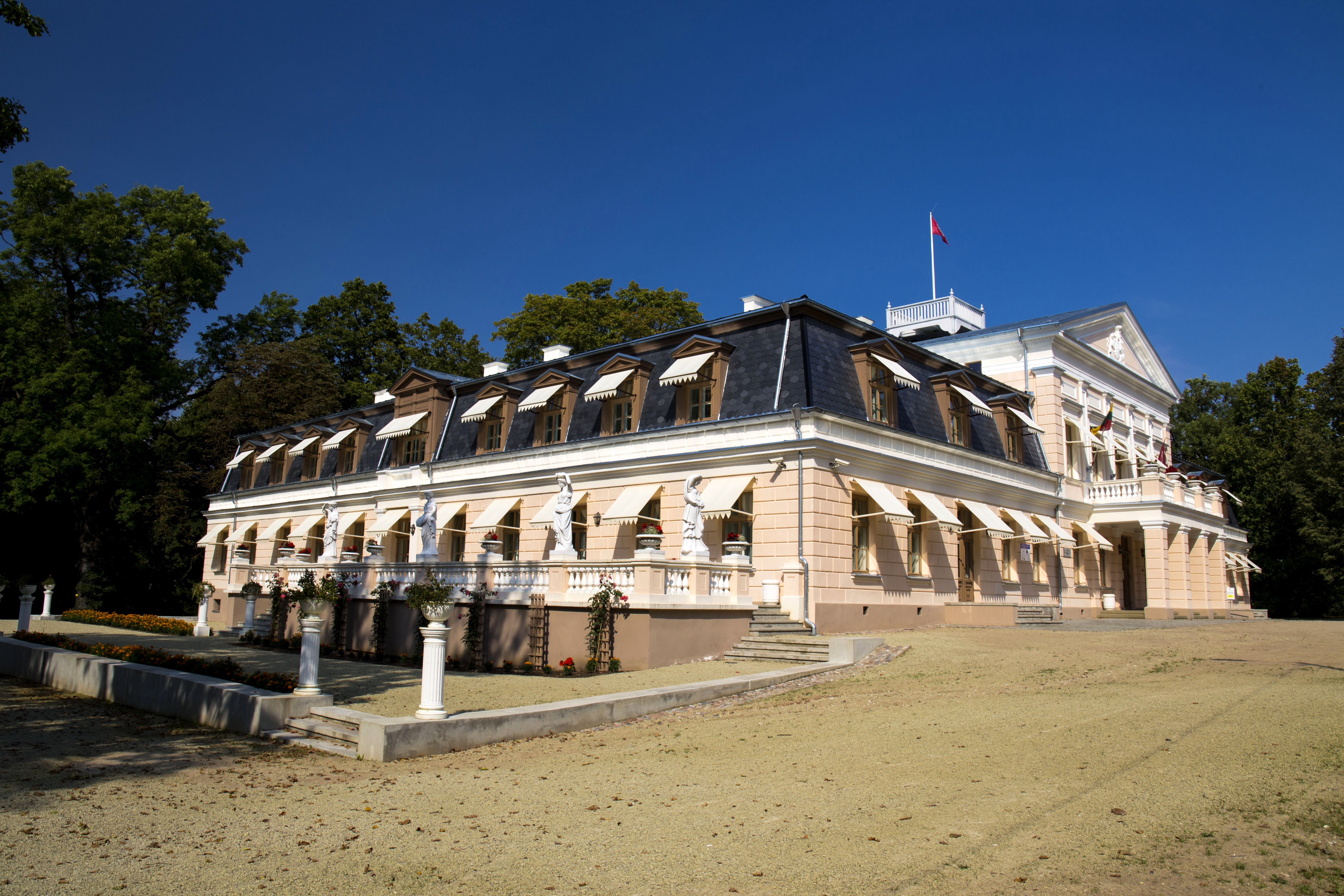 Žagare Grafo Zubovo dvaras